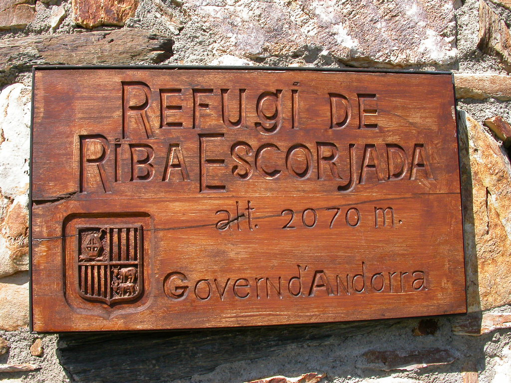 Refuges Andorre